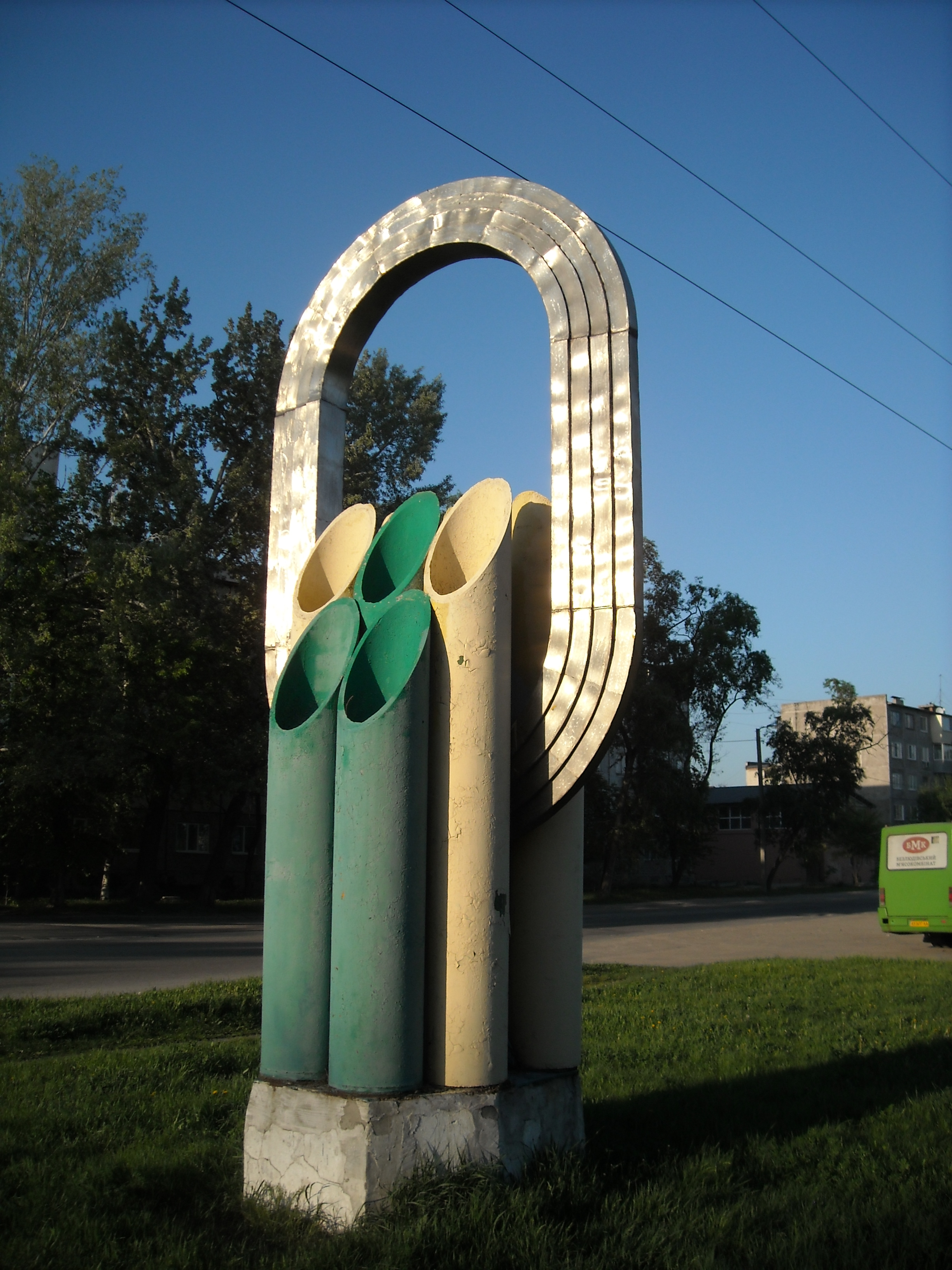 Україна. Місто Харків. Селище Основа. Інсталяція біля Основ'янського озера присвячена Олімпійським іграм 1980 року. Світлина 2017 року.